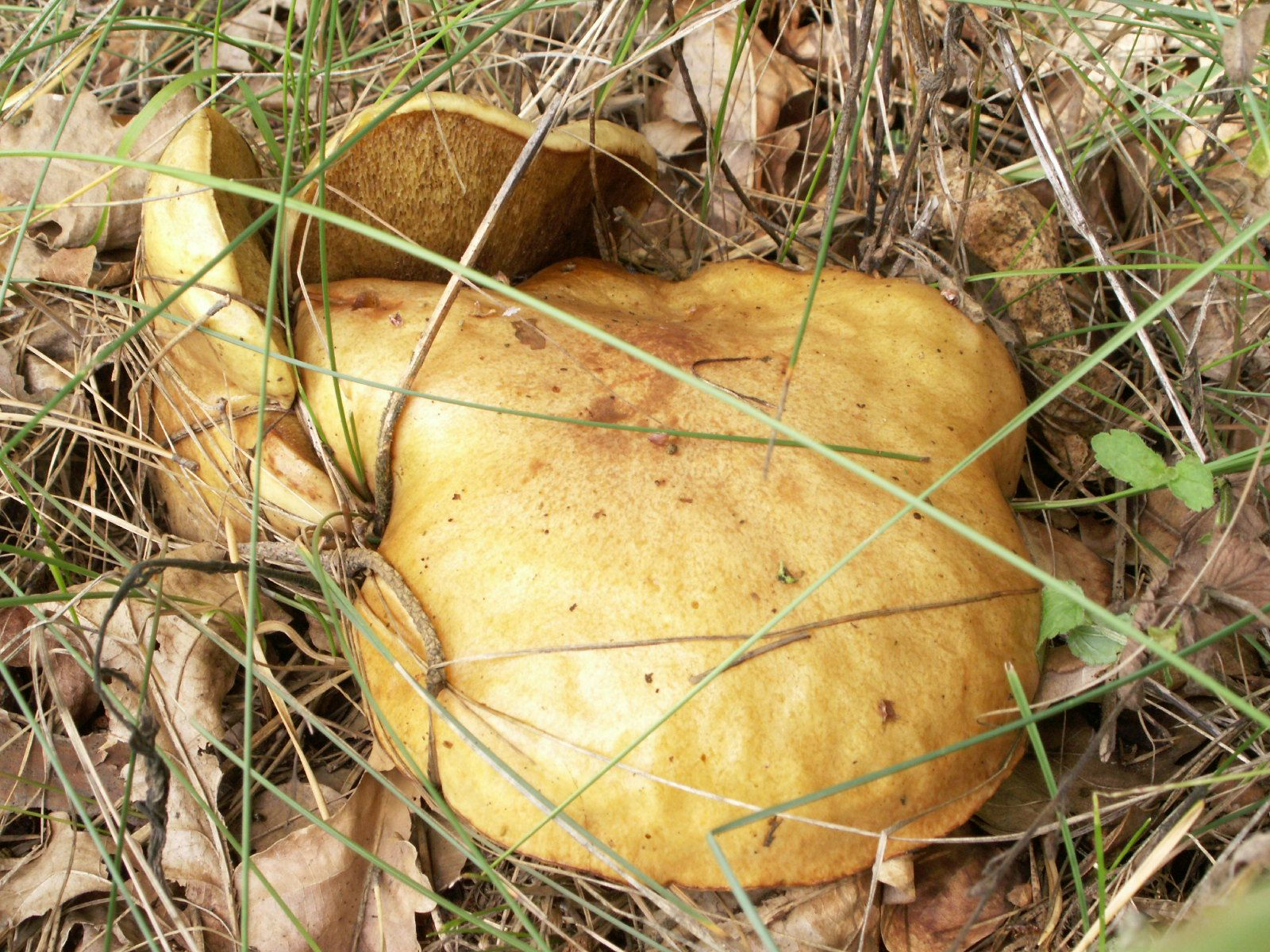 Suillus_granulatus, alter Pilz am Nadelwald